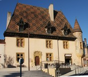 Bâtiment style Renaissance dont la construction a commencer à la fin du XVème siècle. Il dispose d'une charpente magestueuse type carène de bateau renversée. Lieu d'exposition de peintures et sculpture, Syndicat d'Initiative, Bibliothèque.